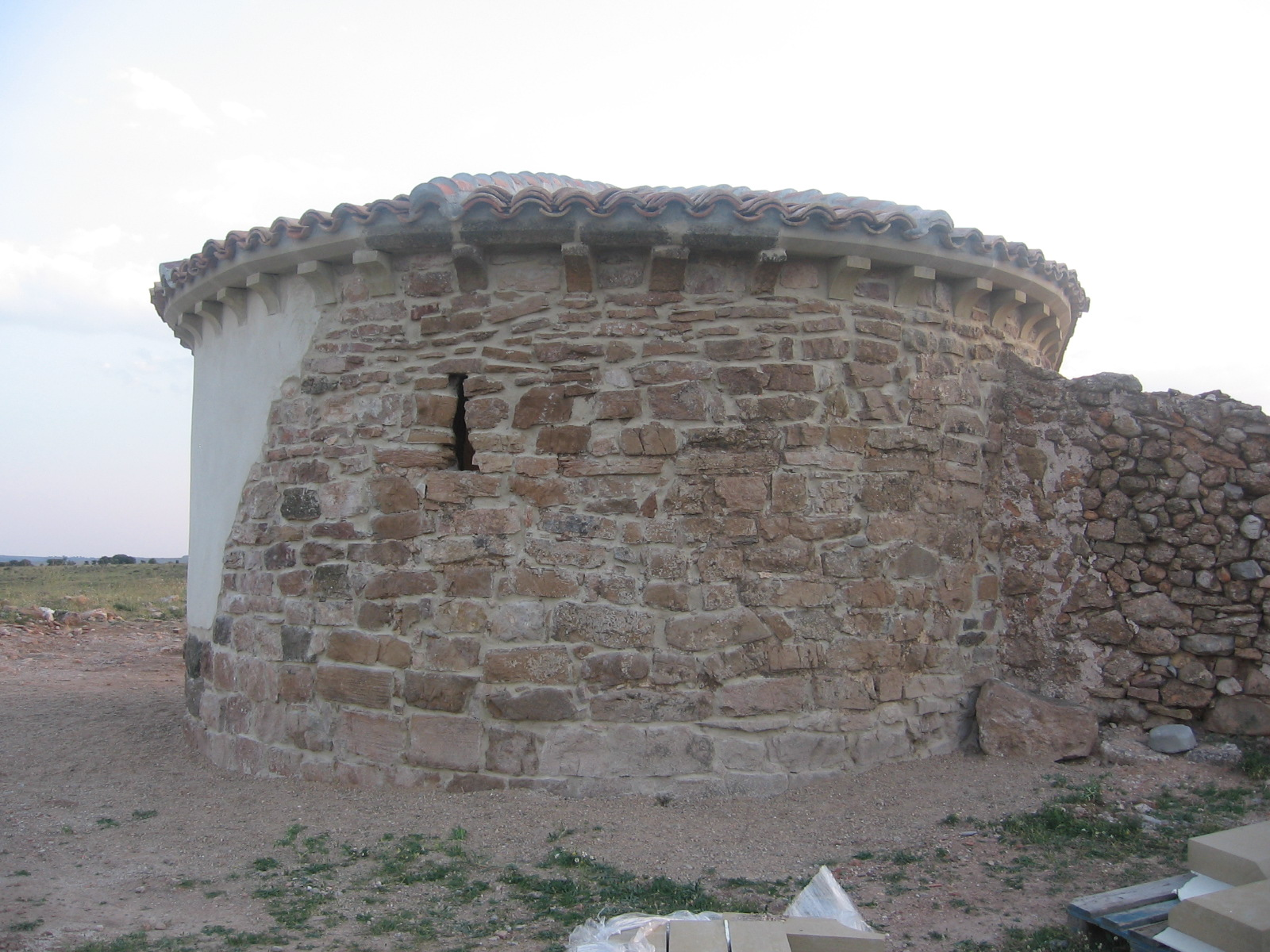 Ermita románica de Santa maría, reconstruida